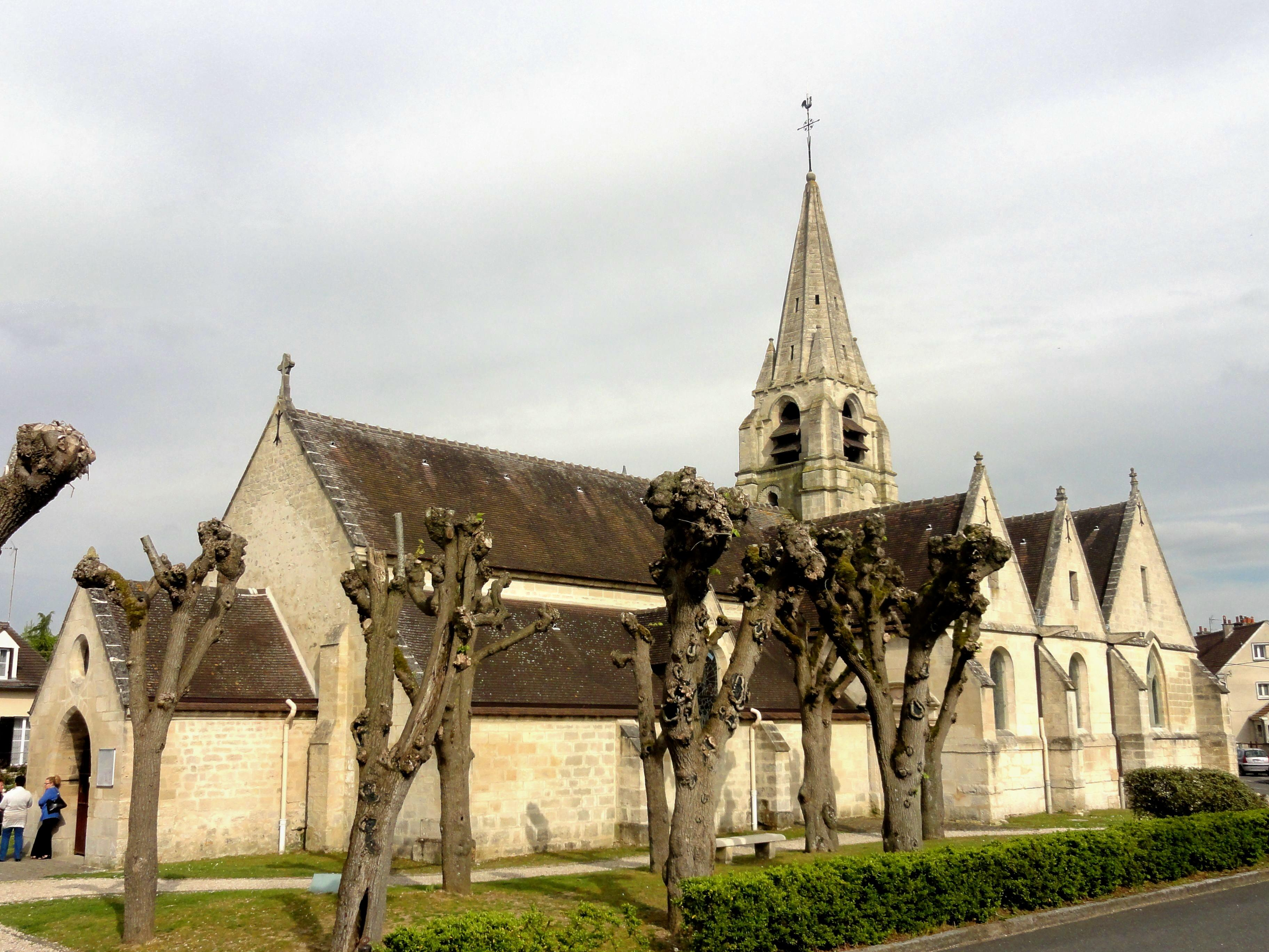 Vue depuis le sud-ouest.